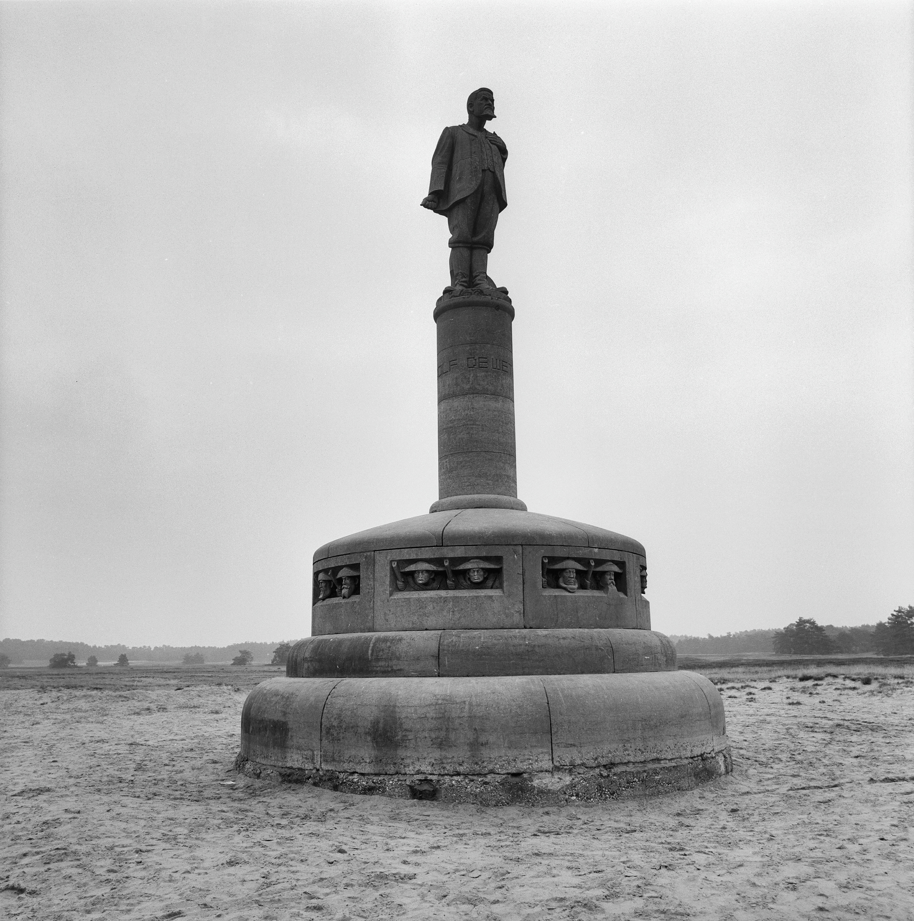 MONUMENT DE WET: Exterieur